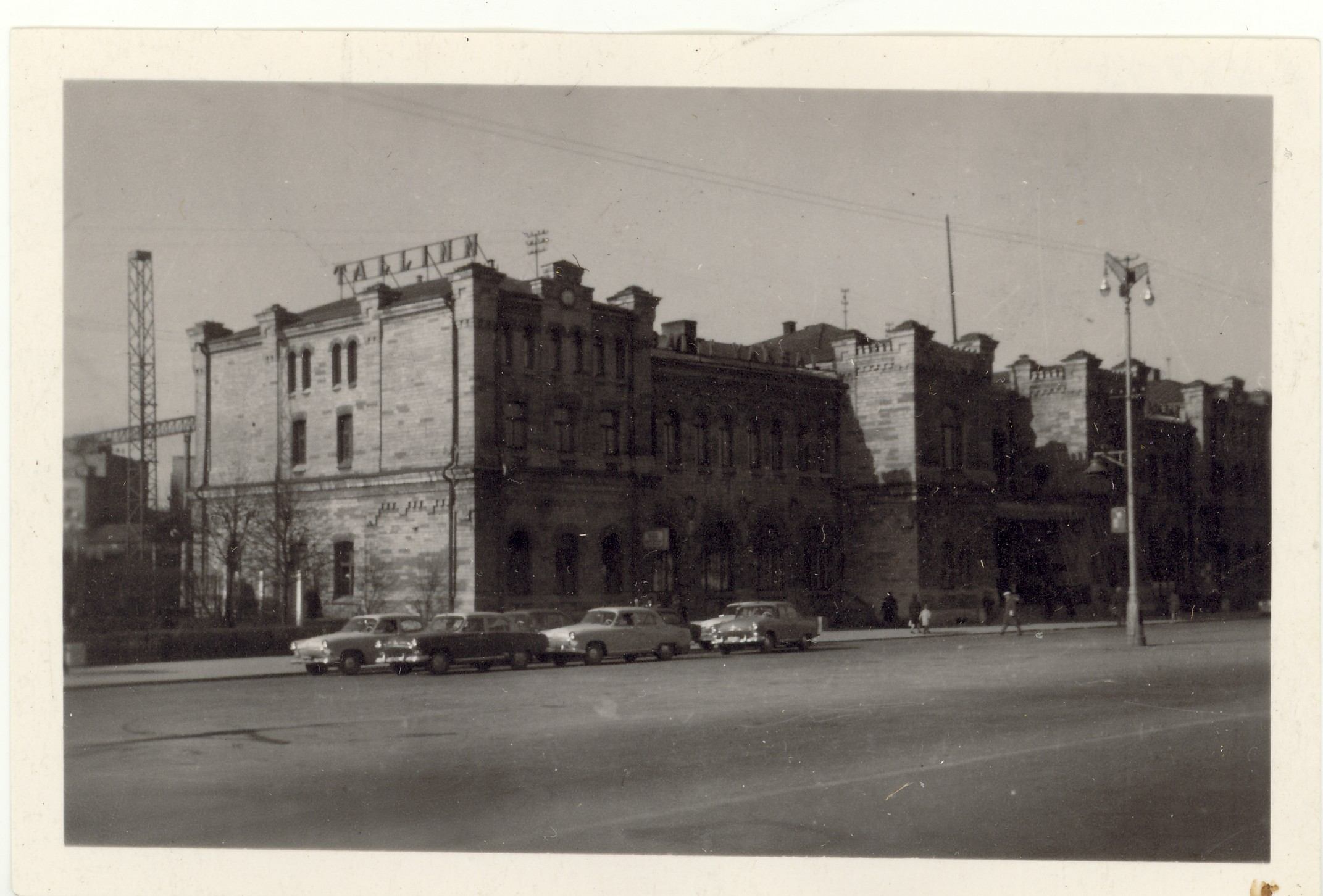 Balti jaam